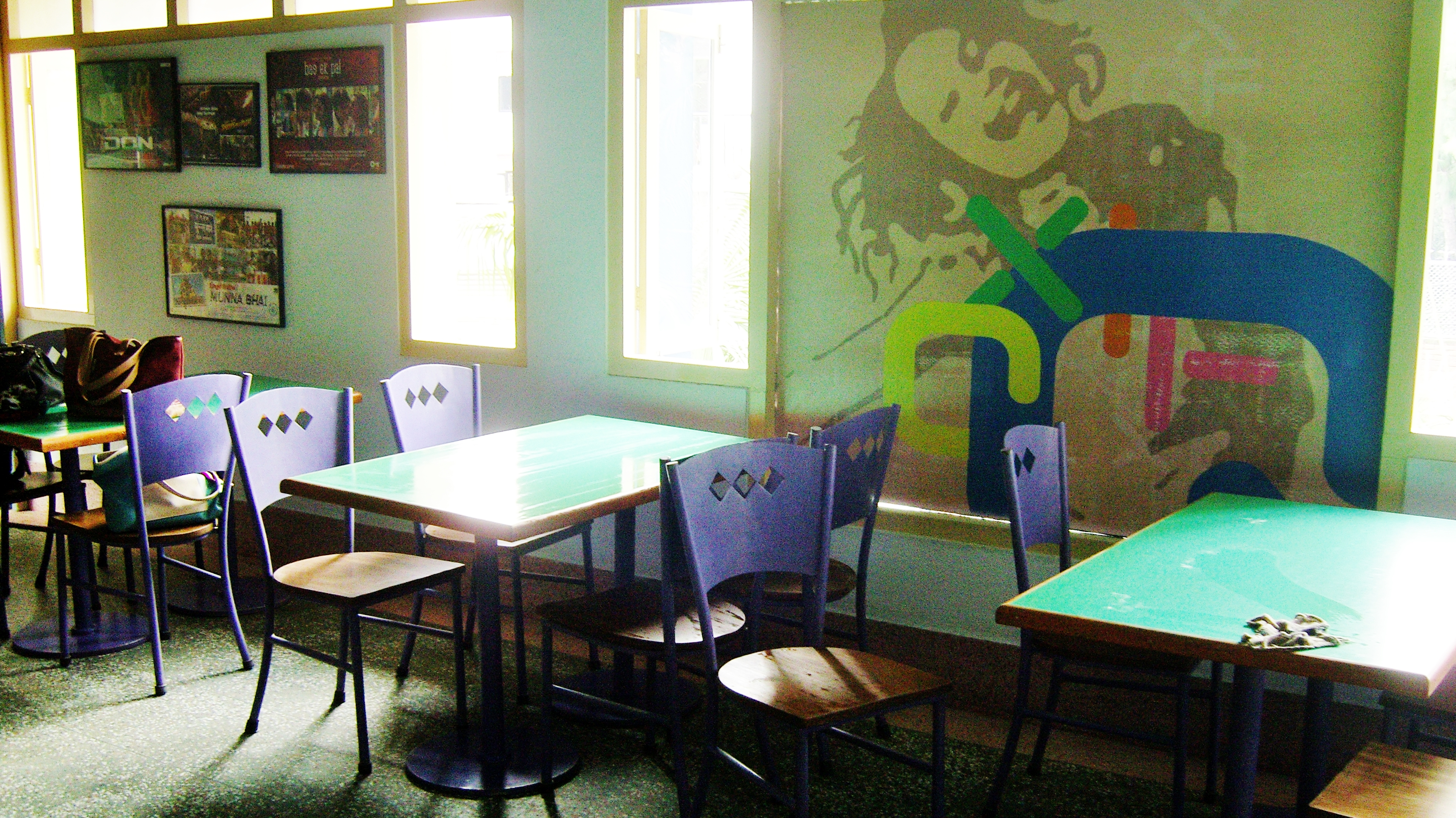 नेपाली: QFX को खाजा खाने ठाउँ